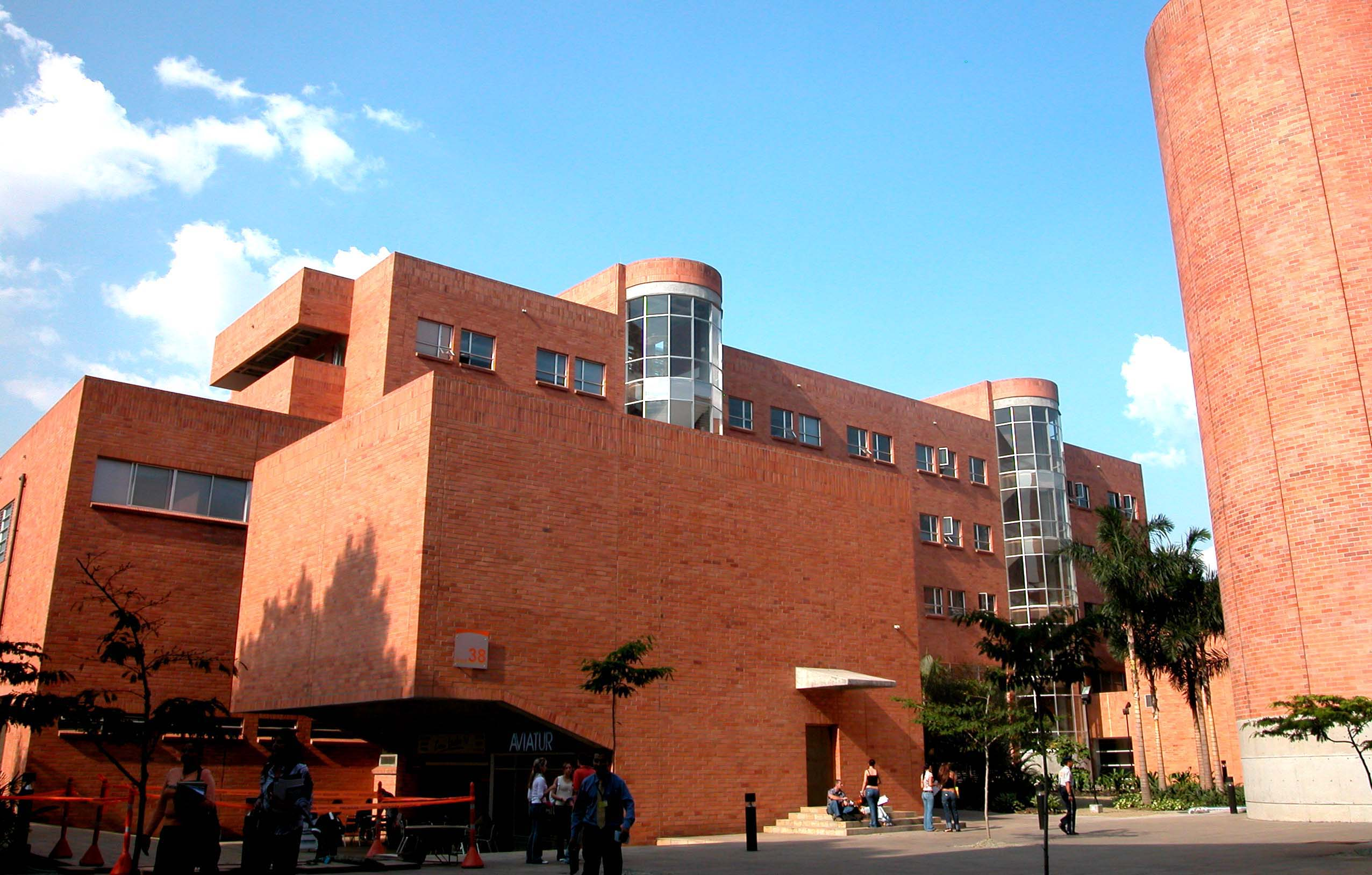 Bloque 38 de la Universidad EAFIT, Medellín, Colombia